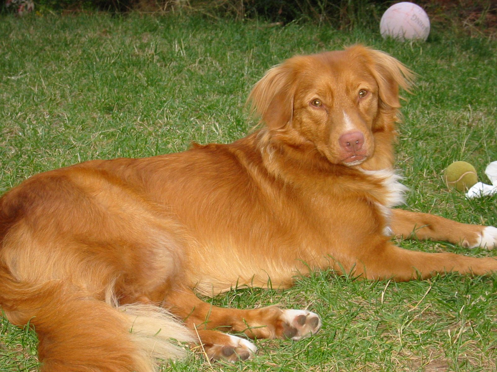 Nova scotia Duck Tolling retriver